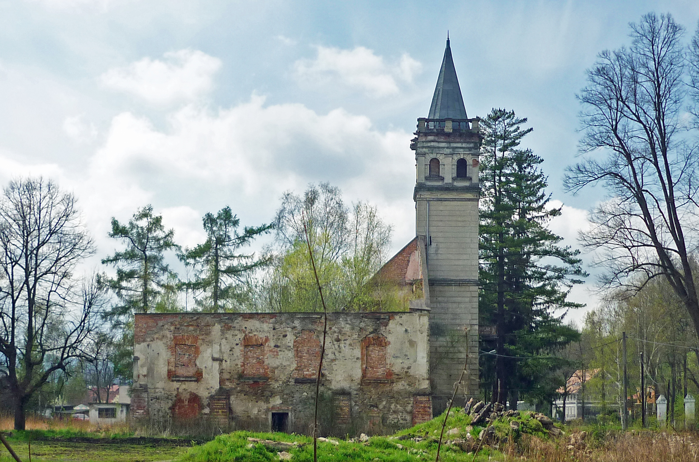 Schlossruine in Berthelsdorf (Barcinek)